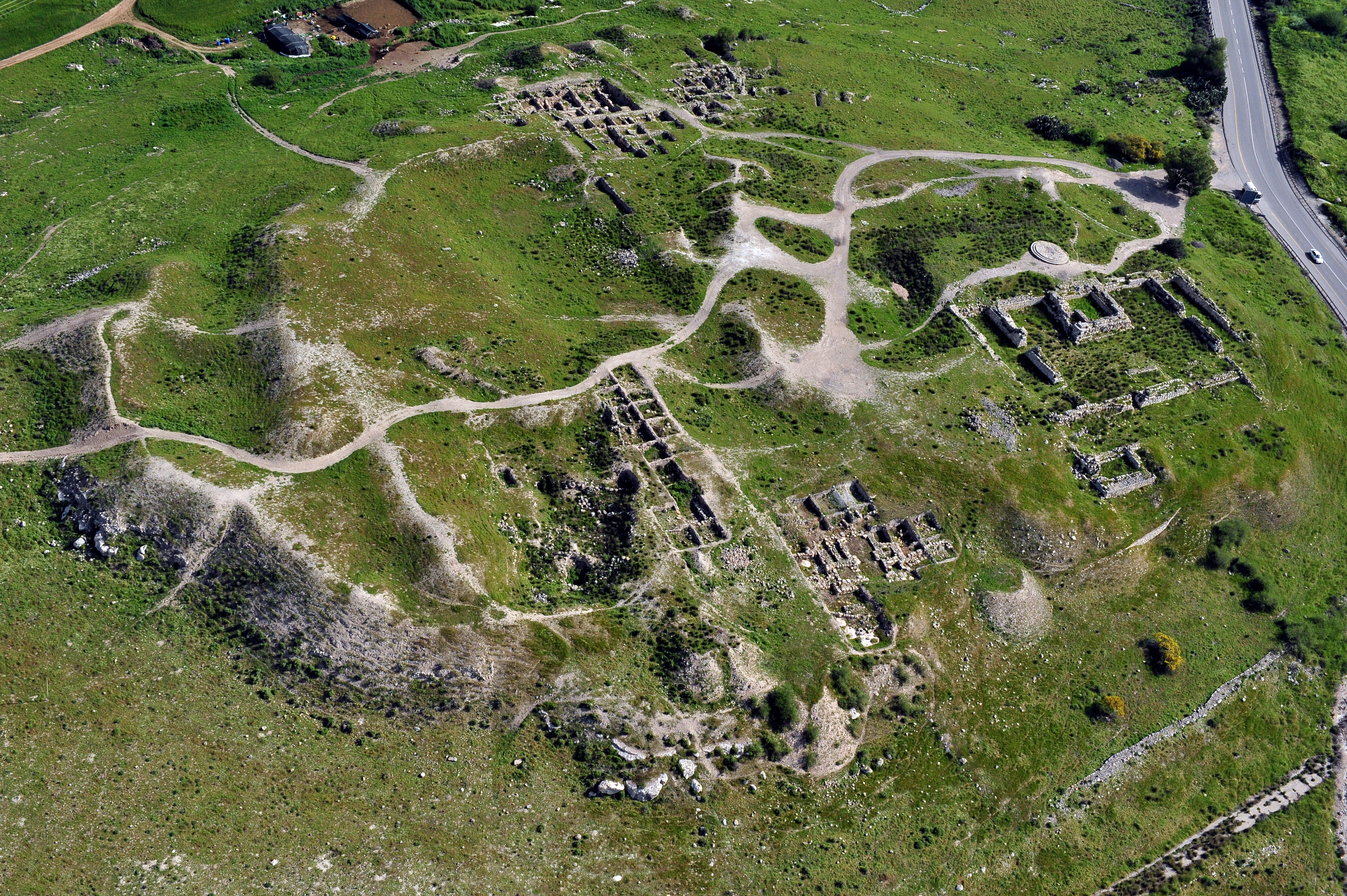 שרידי עיר ממלכתית על הגדה הדרומית של נחל שורק. בחפירות נחשפו חומה, שער, מפעל מים, מתקני תעשייה, בית בד, רובעי מגורים ומנזר. בהמשך השלוחה מערבה, נחשפו מערות קבורה רבות.